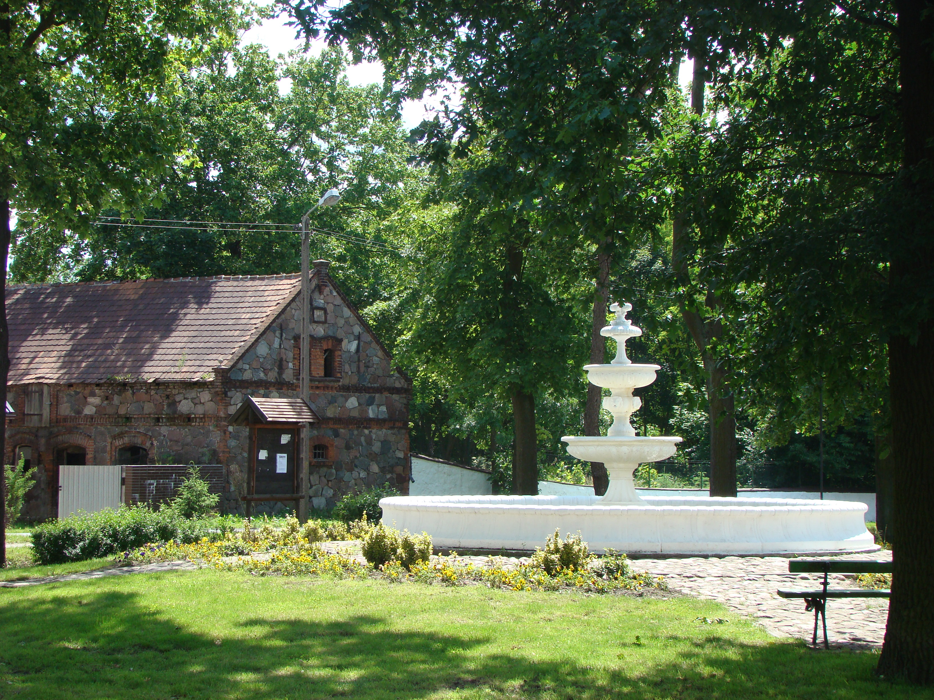 Zentrum von Kowalów (Kohlow)